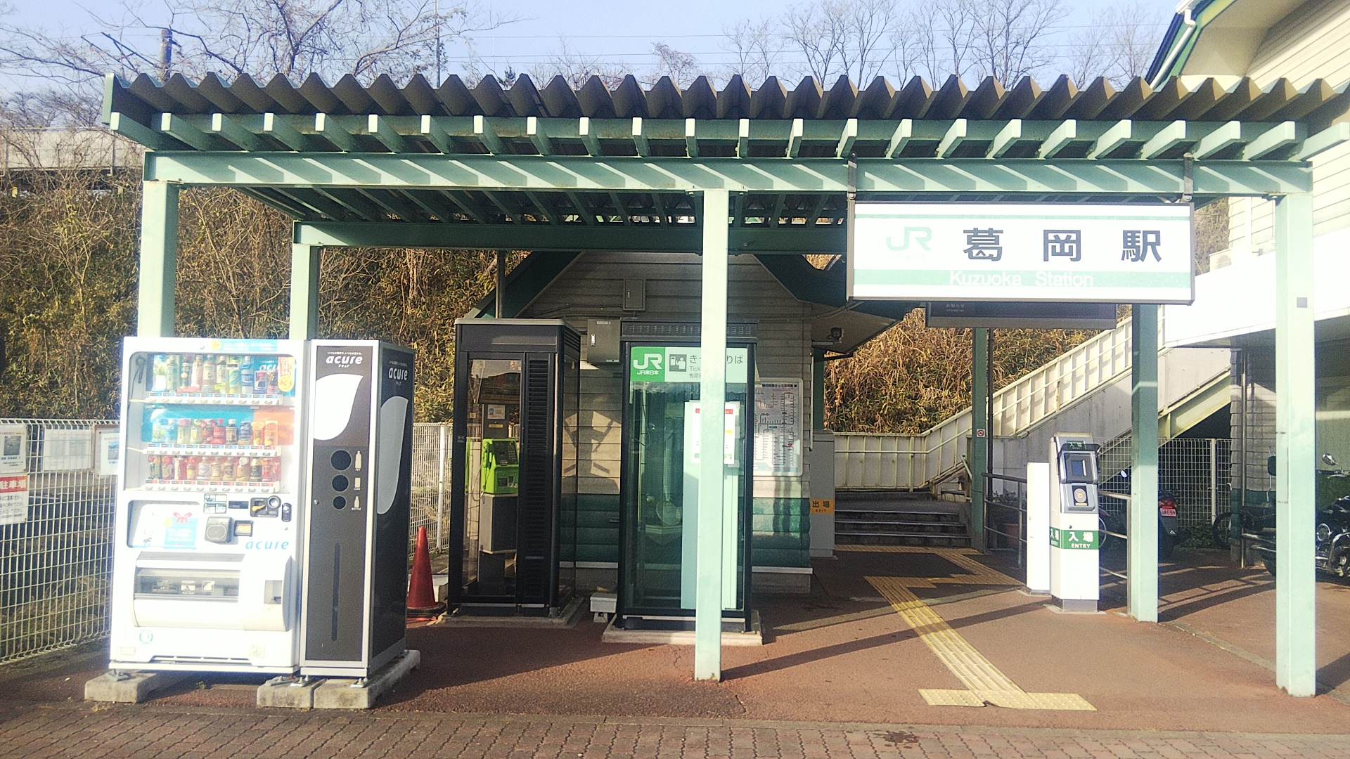 葛岡駅入口（2019年12月）